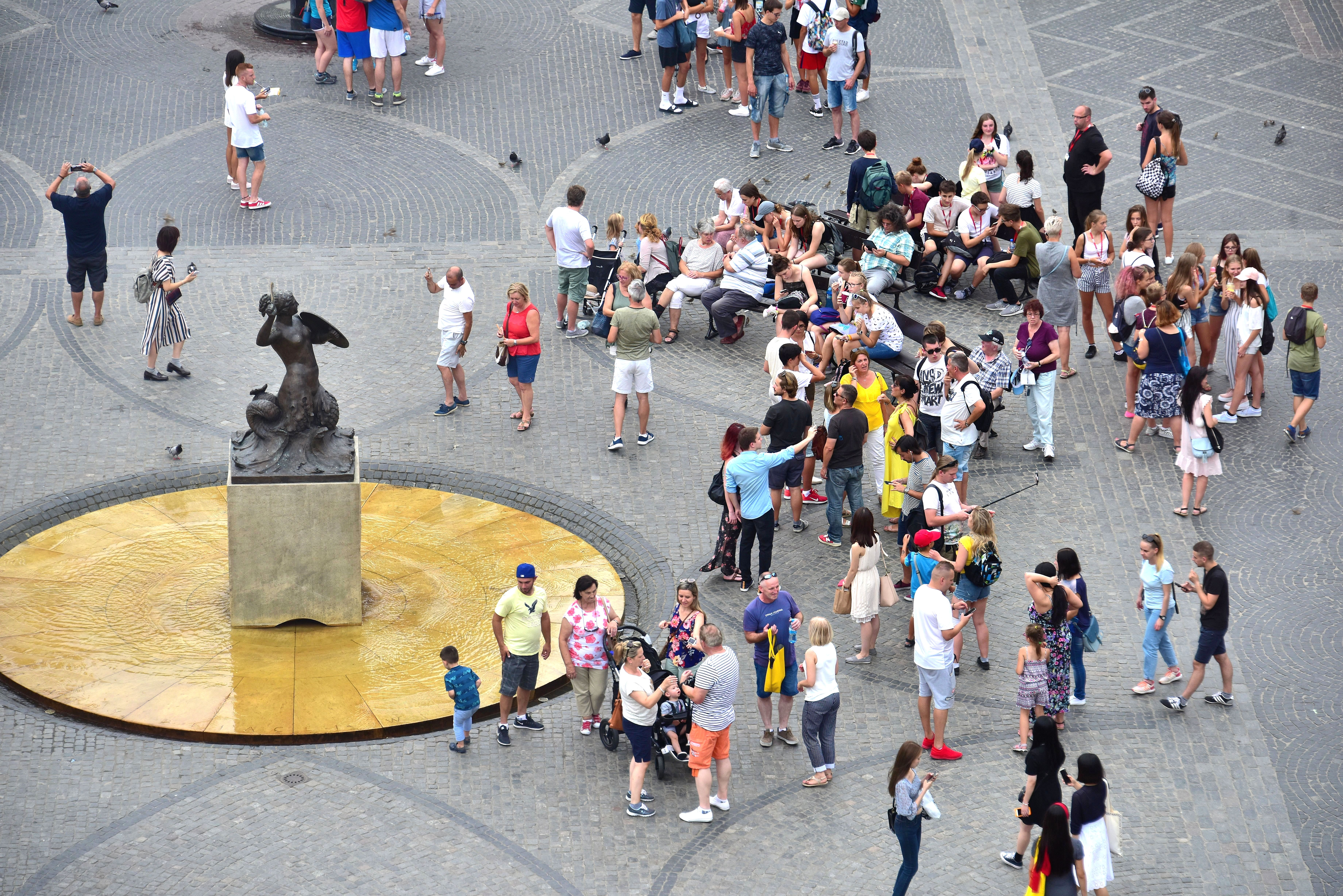 Pomnik Syreny na Rynku Starego Miasta w Warszawie